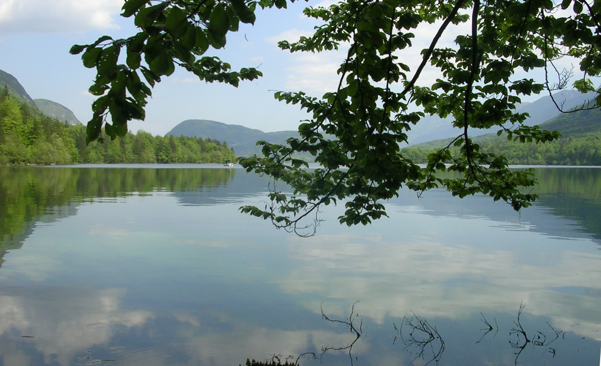 Bohinjsko jezero. Taken in summer 2007